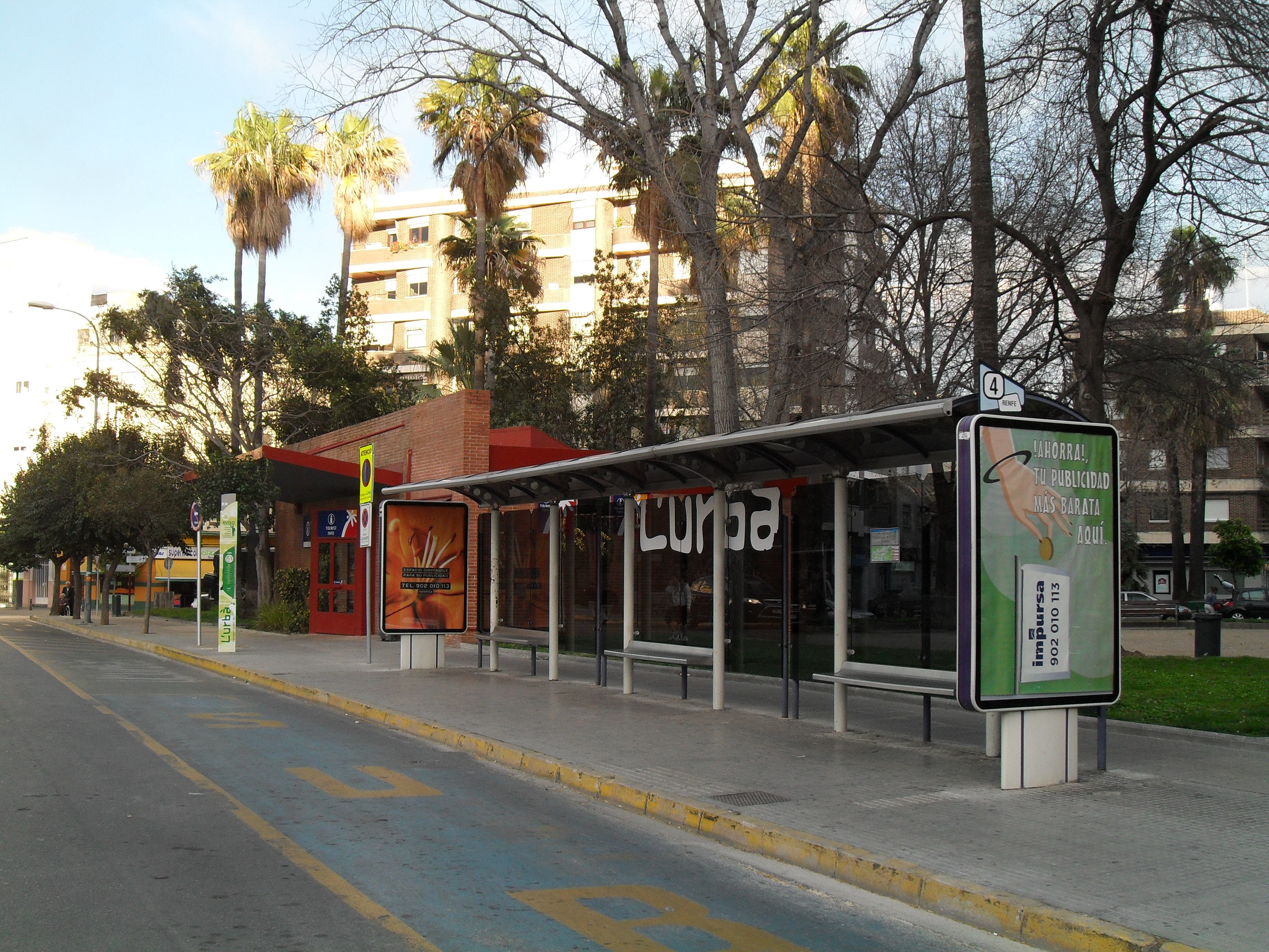 Marquesina en la parada de autobús de RENFE en Gandía